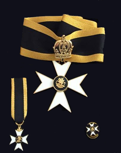 Insignie des St. Georgs-Orden (Habsburg-Lothringen)